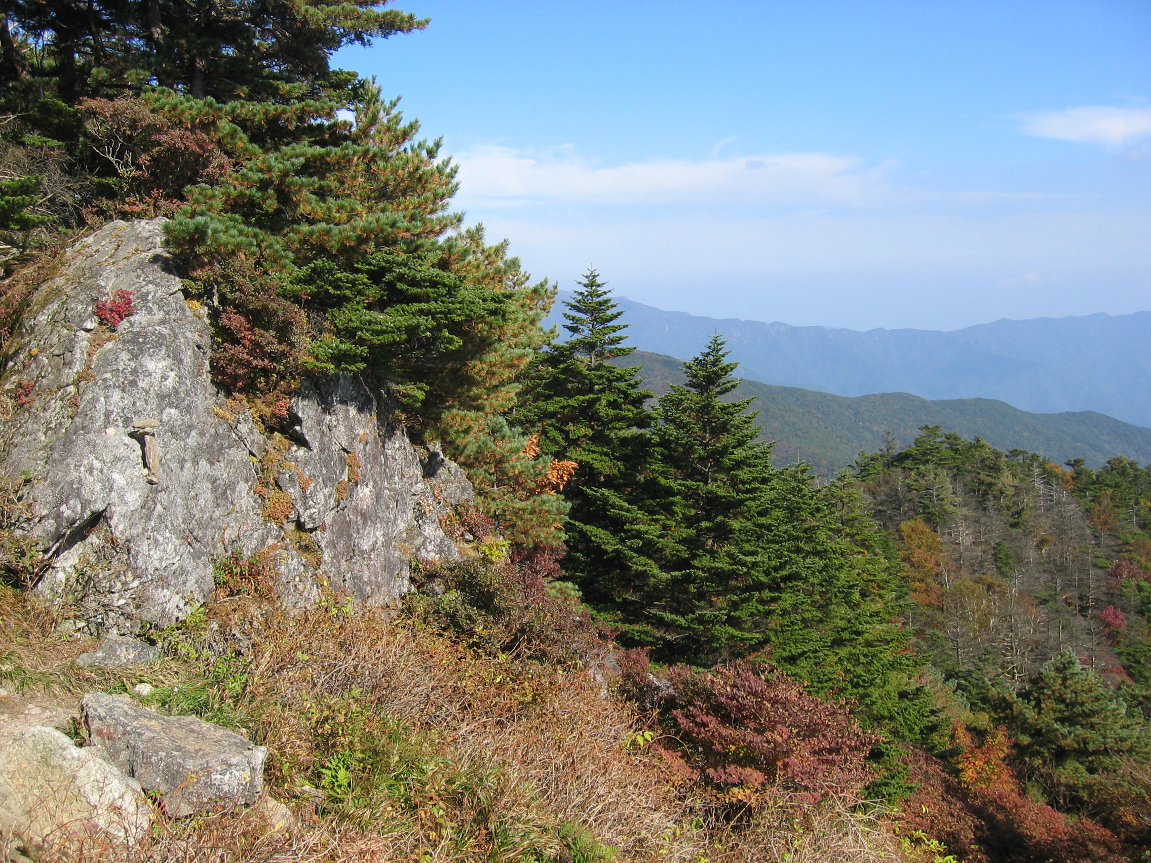 2006년 대한민국 지리산의 모습 The scenery of Jirisan, in South Korea, 2006